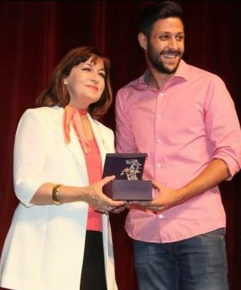 مهرجان الطفل : جائزة افضل ممثل ( عمر حلمي ) 2018